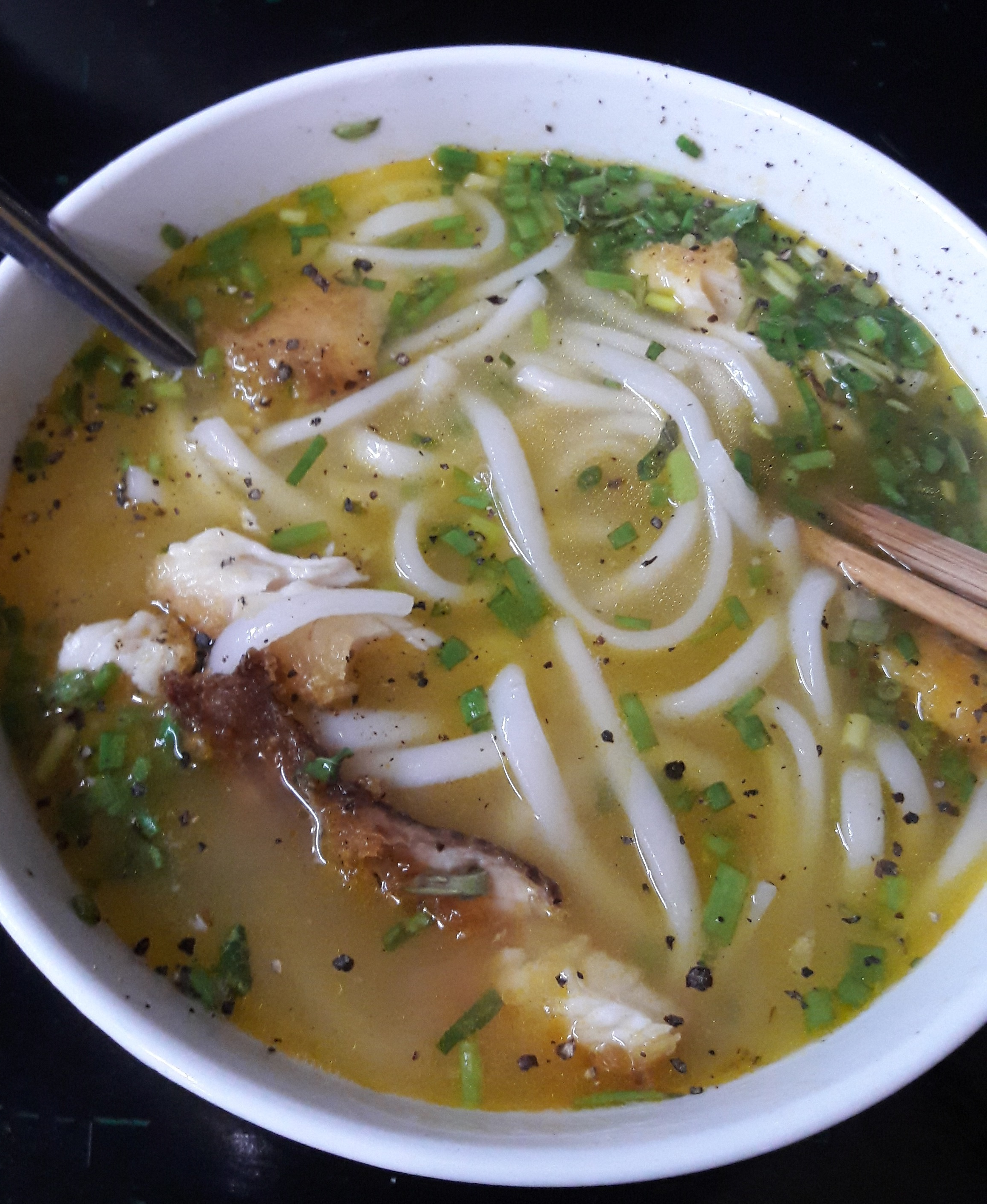 Cuisine of Vietnam